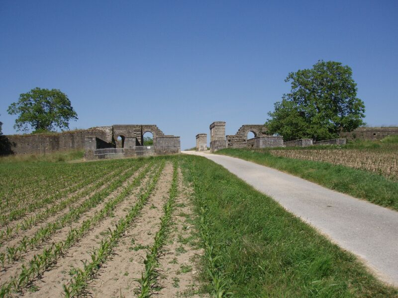 Überreste des Osttores von Aventicum (Avenches)